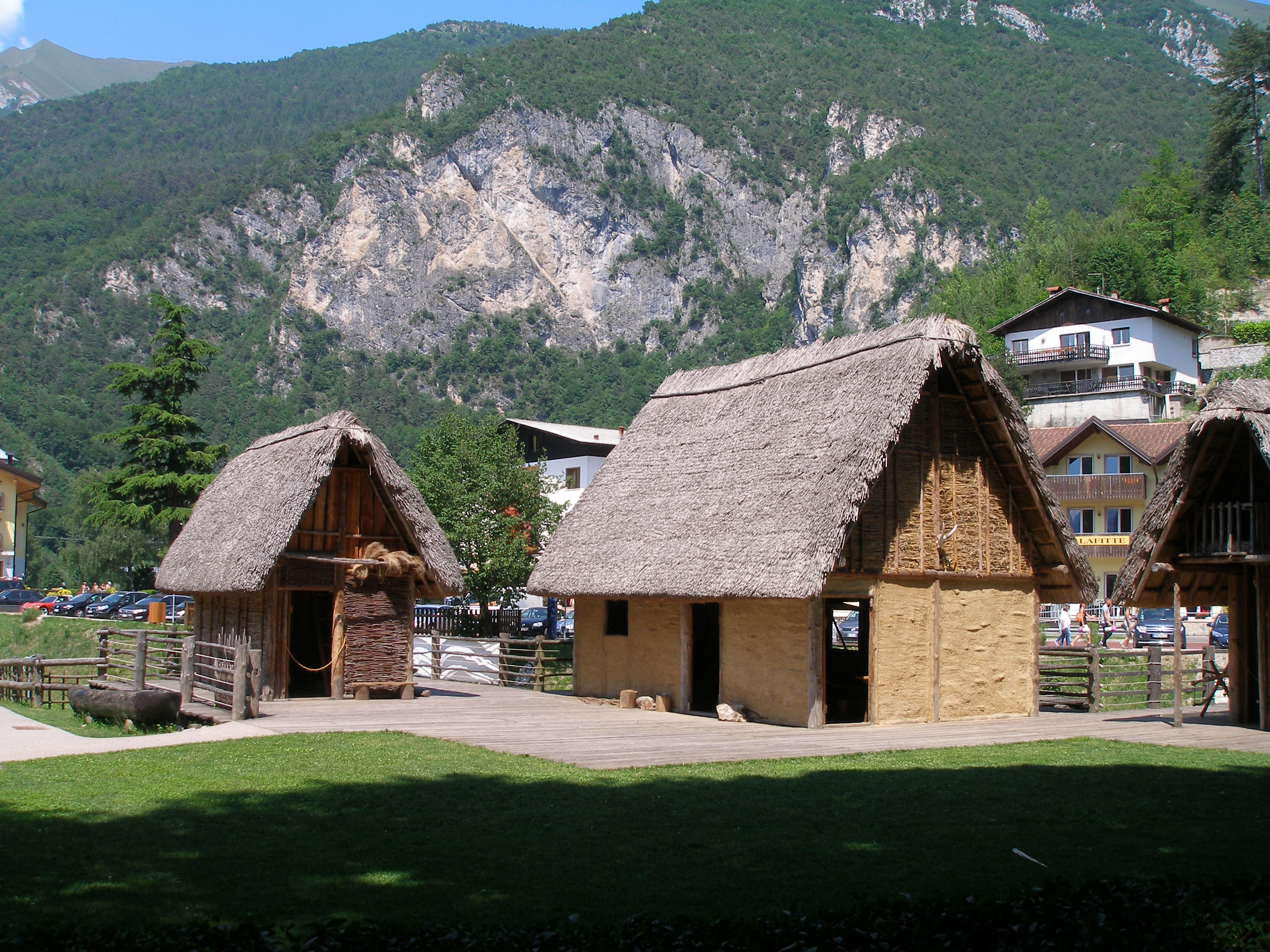 Repliky pravěkých kůlových staveb na břehu Ledrenského jezera Unknown the repartees of the prehistoric stilt houses on the bank of the lake ledro